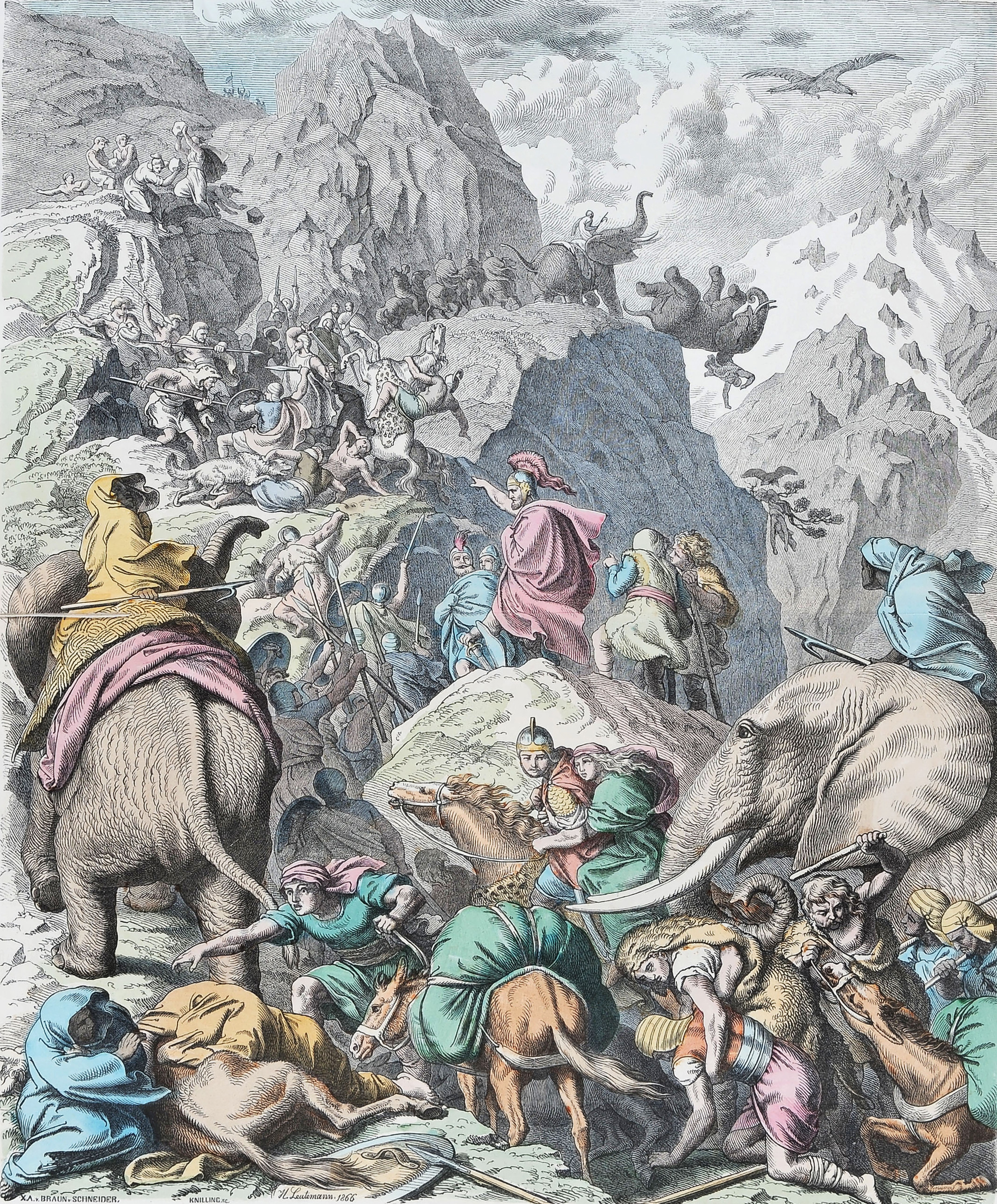 Kolorierter Holzschnitt Die Karthager – Hannibals Übergang über die Alpen von Heinrich Leutemann, erschienen im Münchener Bilderbogen (Blatt 13 der „Bilder aus dem Altertume“; Nr. 438)